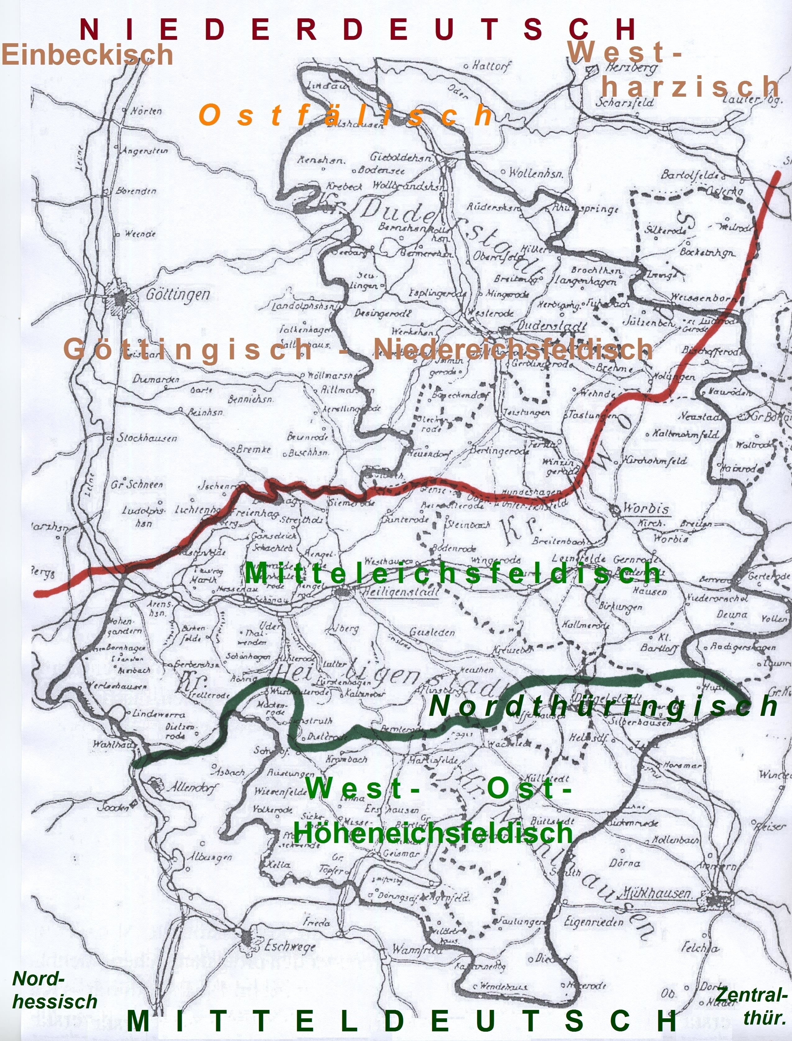 Eichsfelder Dialekte: Sprachgrenze Niederdeutsch- Mittelhochdeutsch=rot und Mundartgrenze Mitteleichsfeldisch-Höheneichsfeldisch=grün